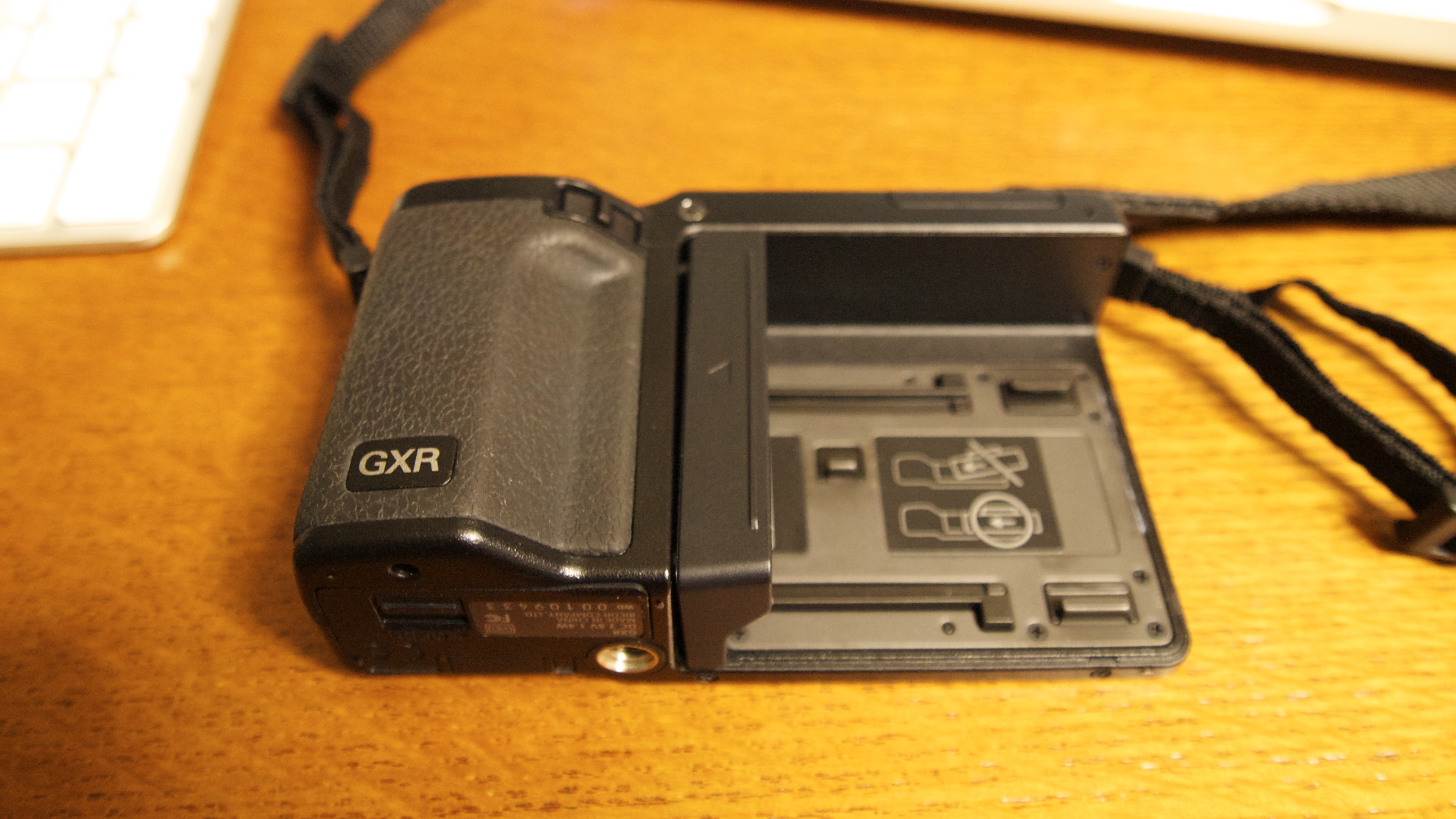 GXR body